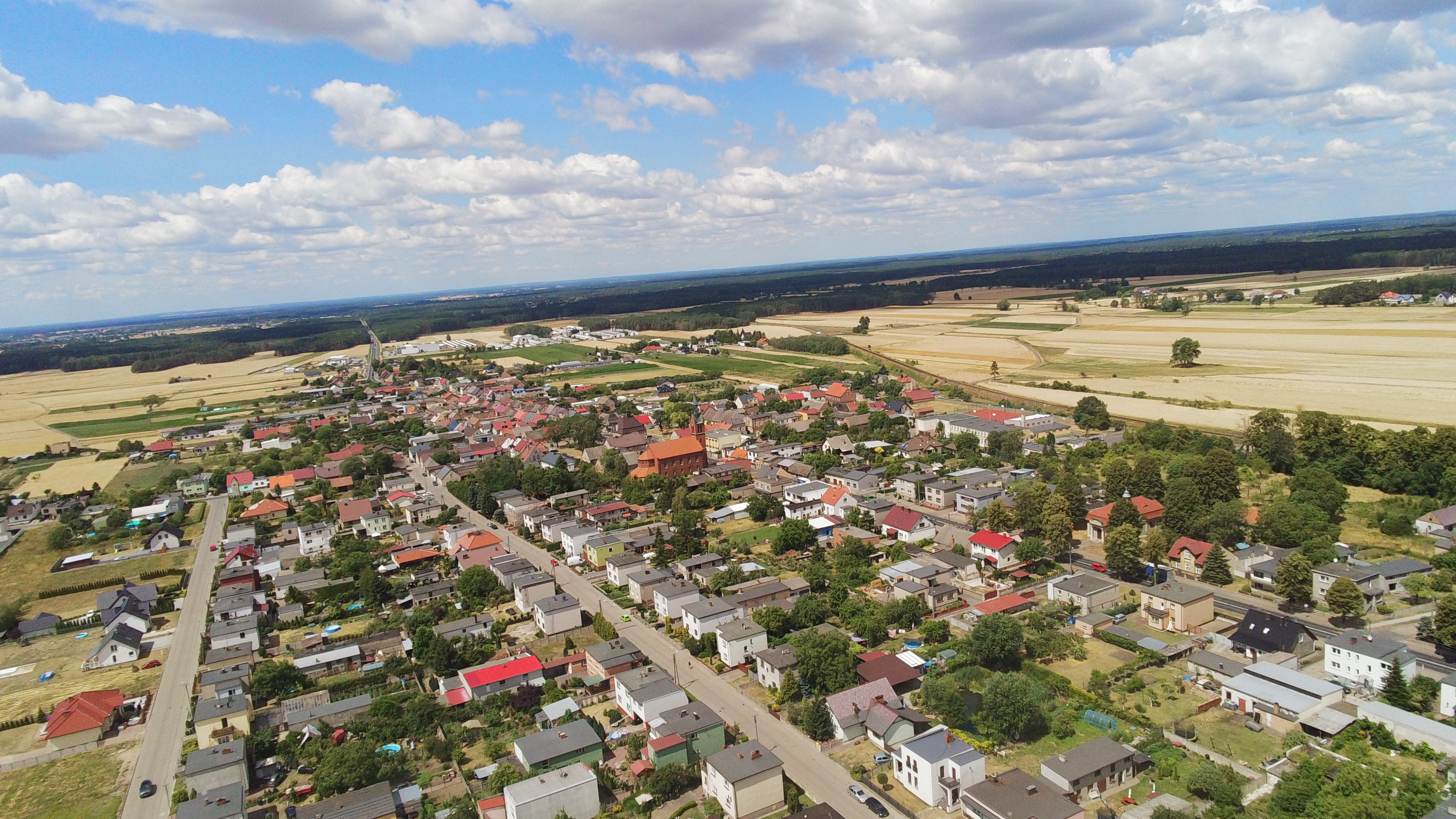 zdjęcie Rostarzewa Lipiec 2019